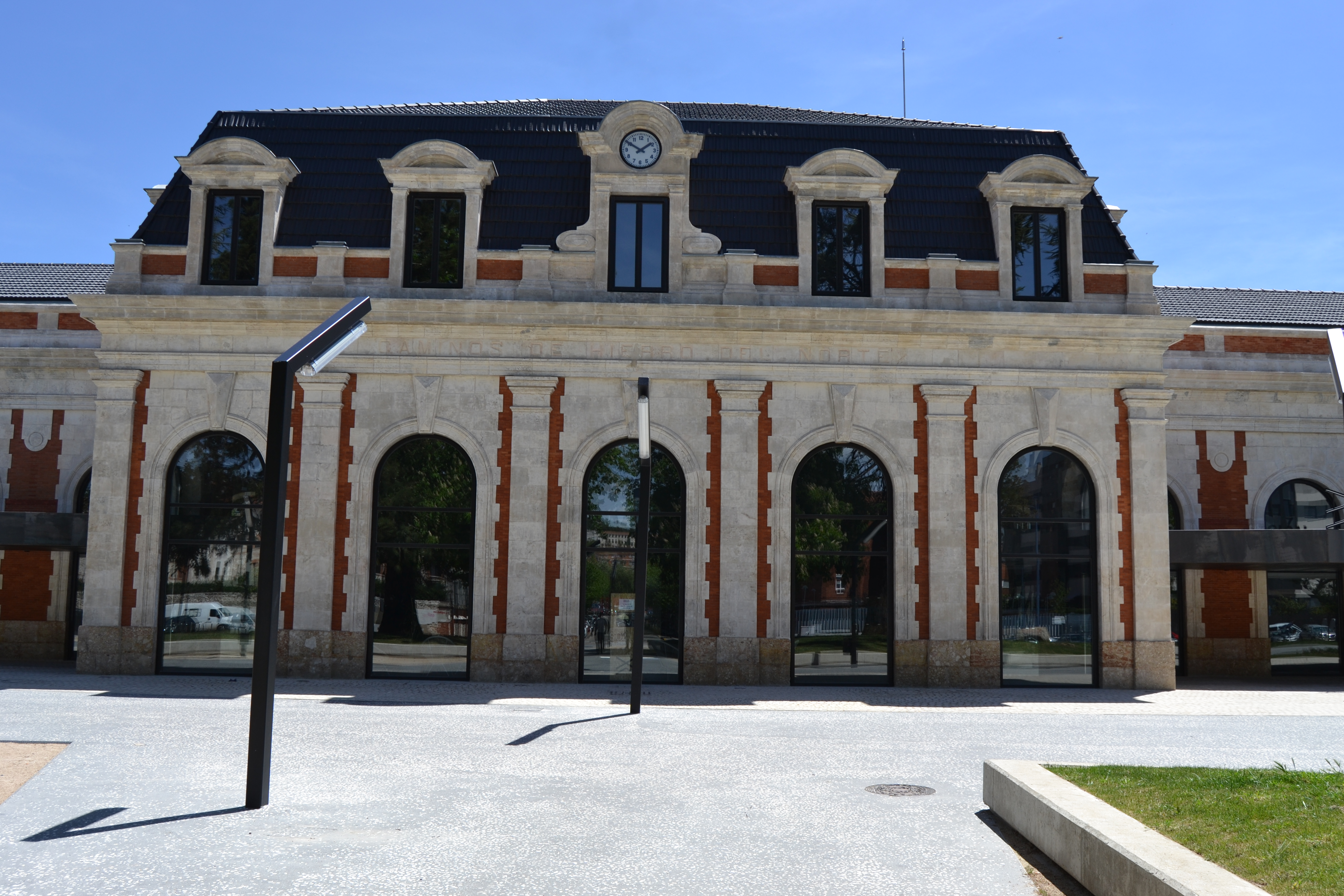 Burgos, España